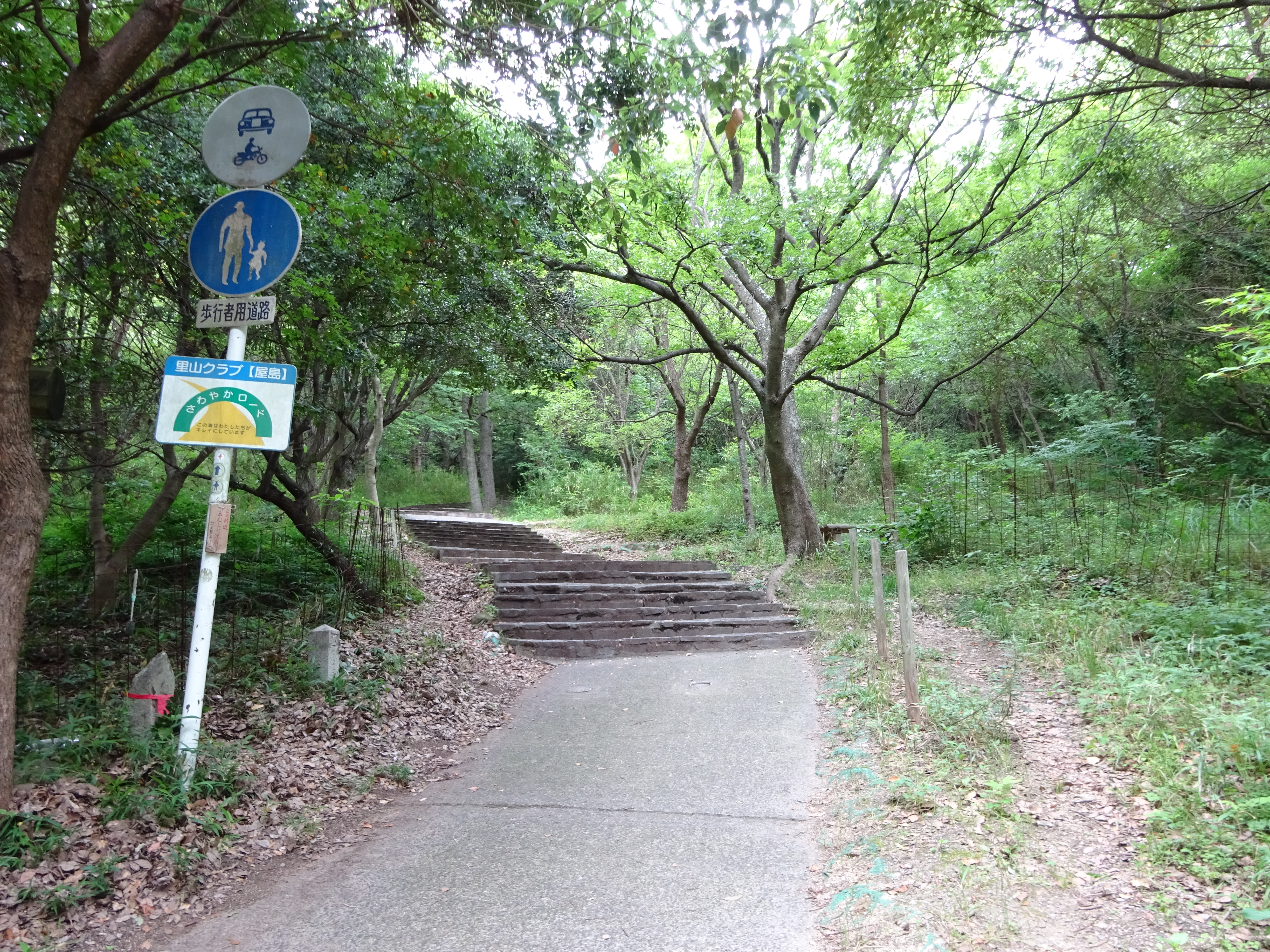 Ｒ１４号の車止め、この先は歩行者専用遊歩道（六月）